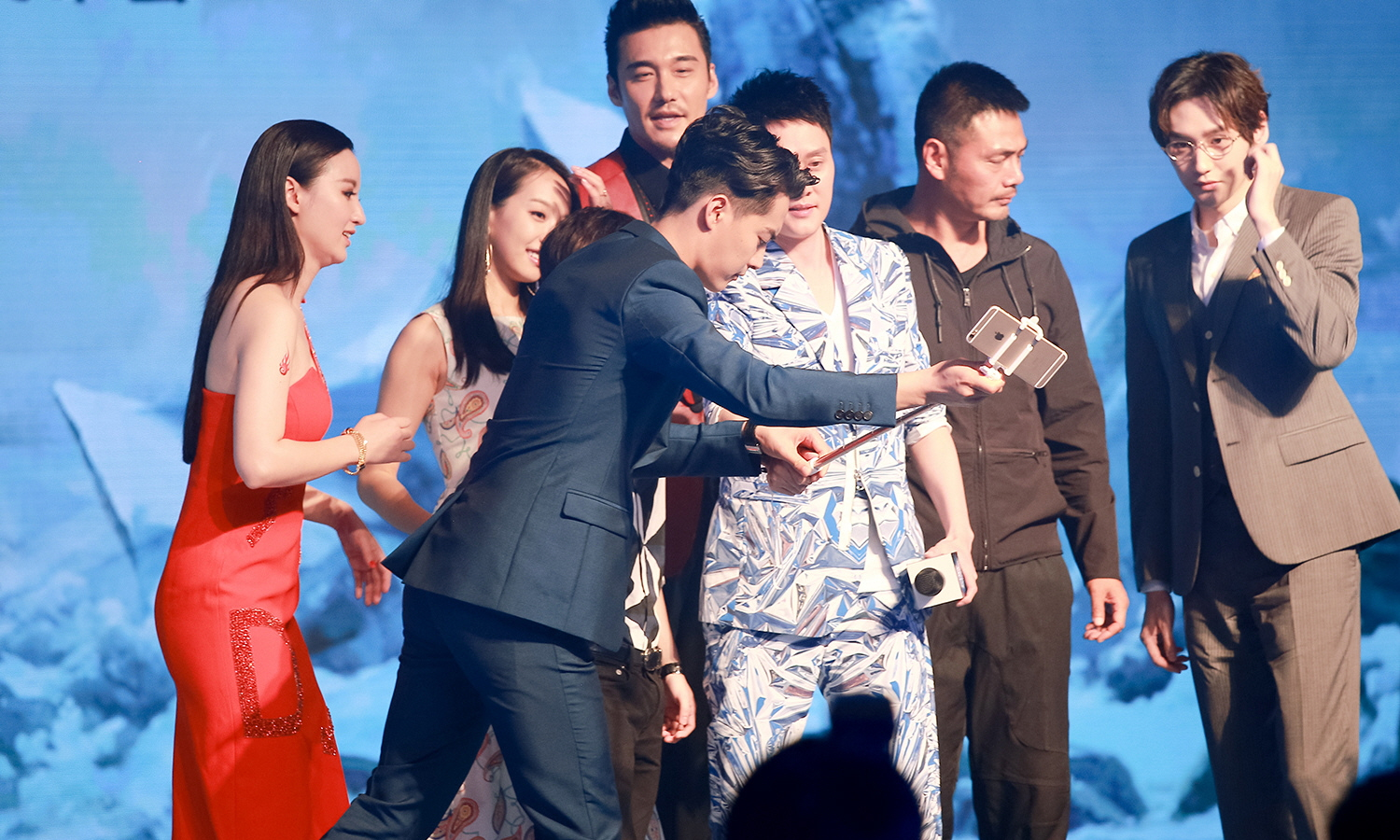 150812 《幻城》发布会